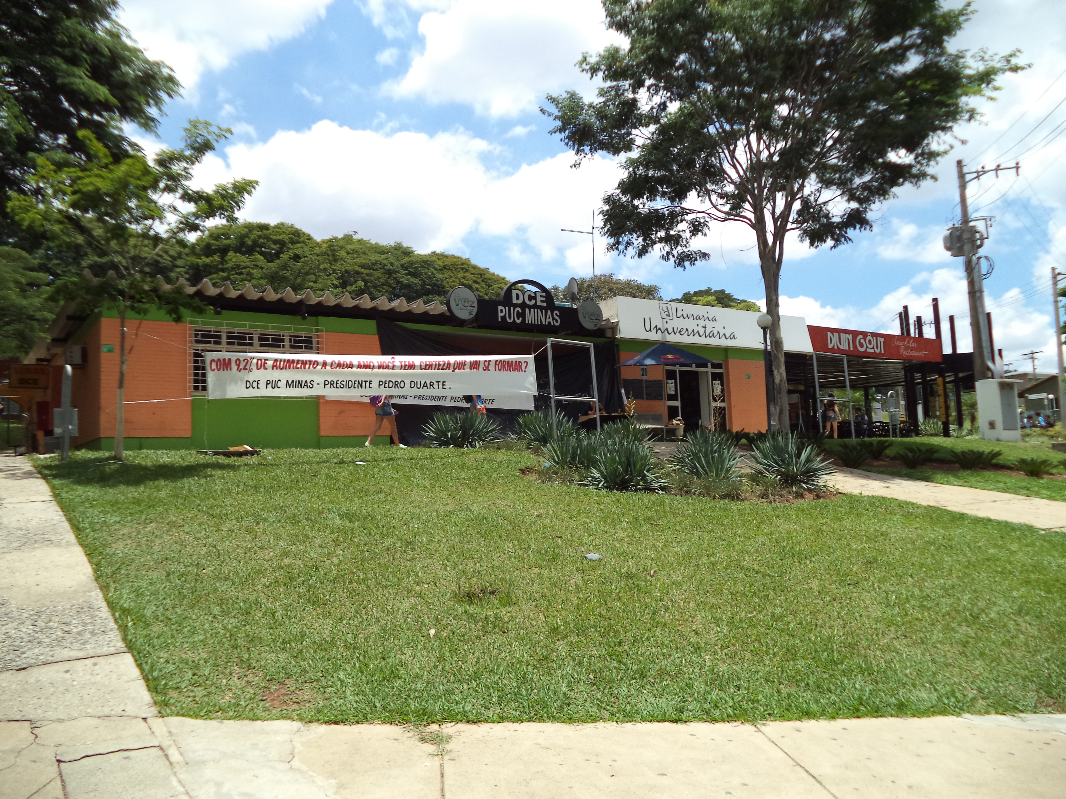 DCE da PUC MInas